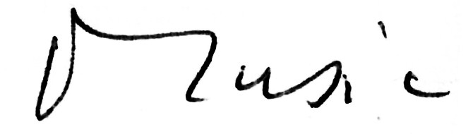 Signature du peintre Zoran Music, scan d'après dédicace d'un catalogue. This signature is believed to be ineligible for copyright and therefore in the public domain because it falls below the required level of originality for copyright protection both in the United States and in the source country (if different). In this case, the source country (e.g. the country of nationality of the signatory) is believed to be France. Cette image ou le texte qui y est représenté est seulement composé de formes géométriques simples et de texte. Elle n’atteint pas le seuil d'originalité nécessaire pour la protection du droit d’auteur, et est donc du domaine public. See autographs of Magritte and Picasso